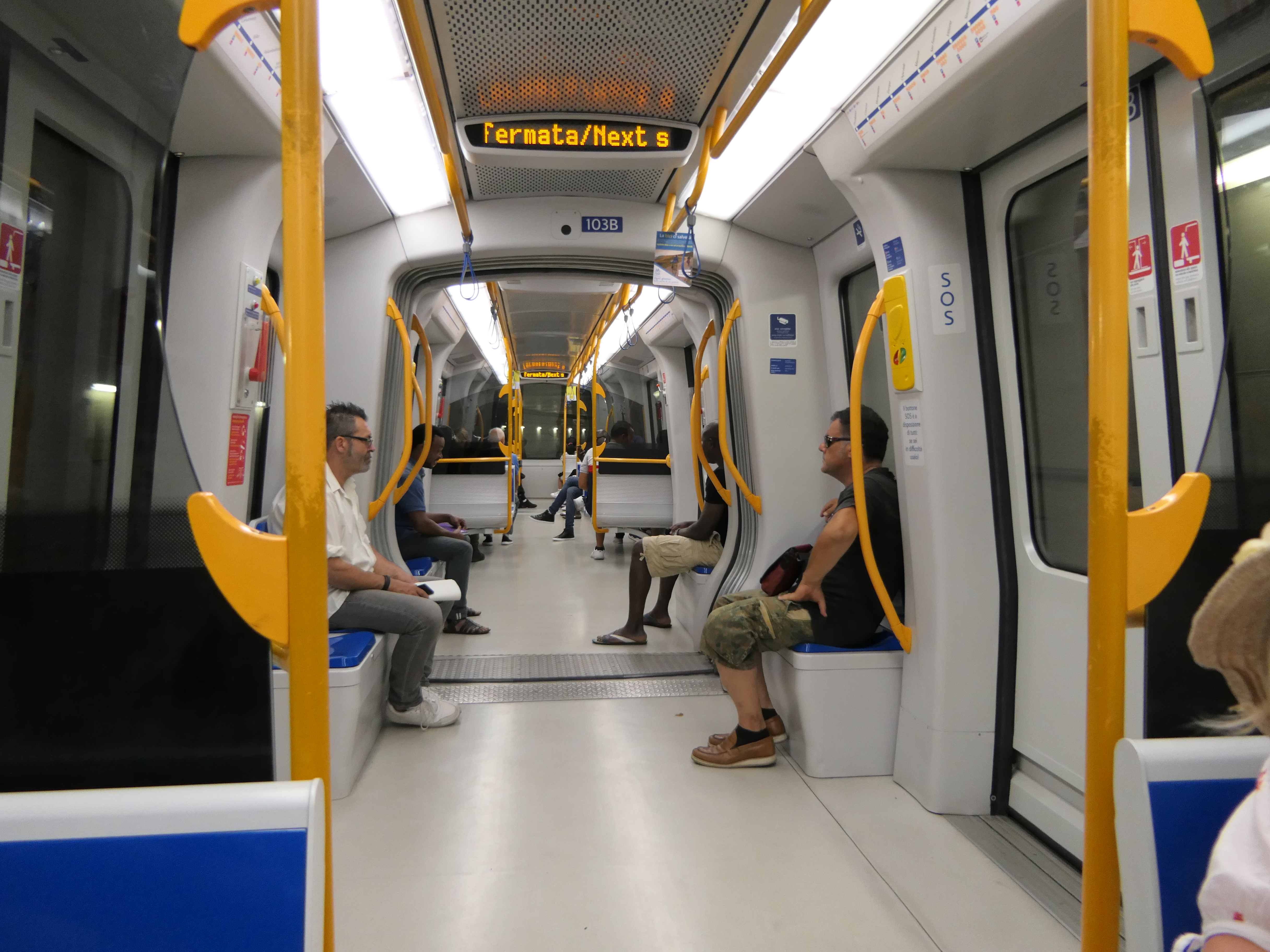 Innenansicht eines U-Bahnzuges der Firma AnsaldoBreda in Brescia.